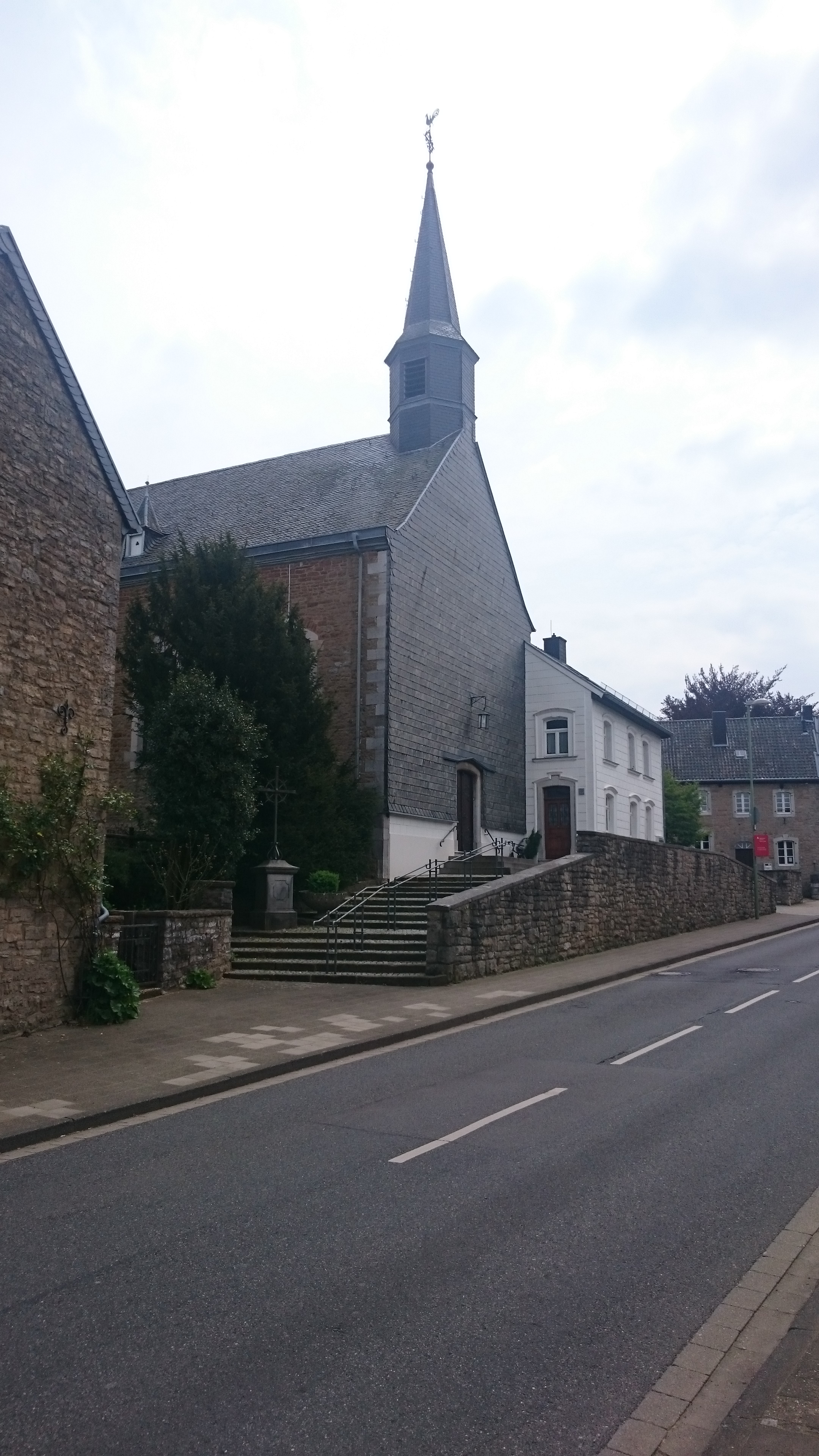 Kirche Venwegen